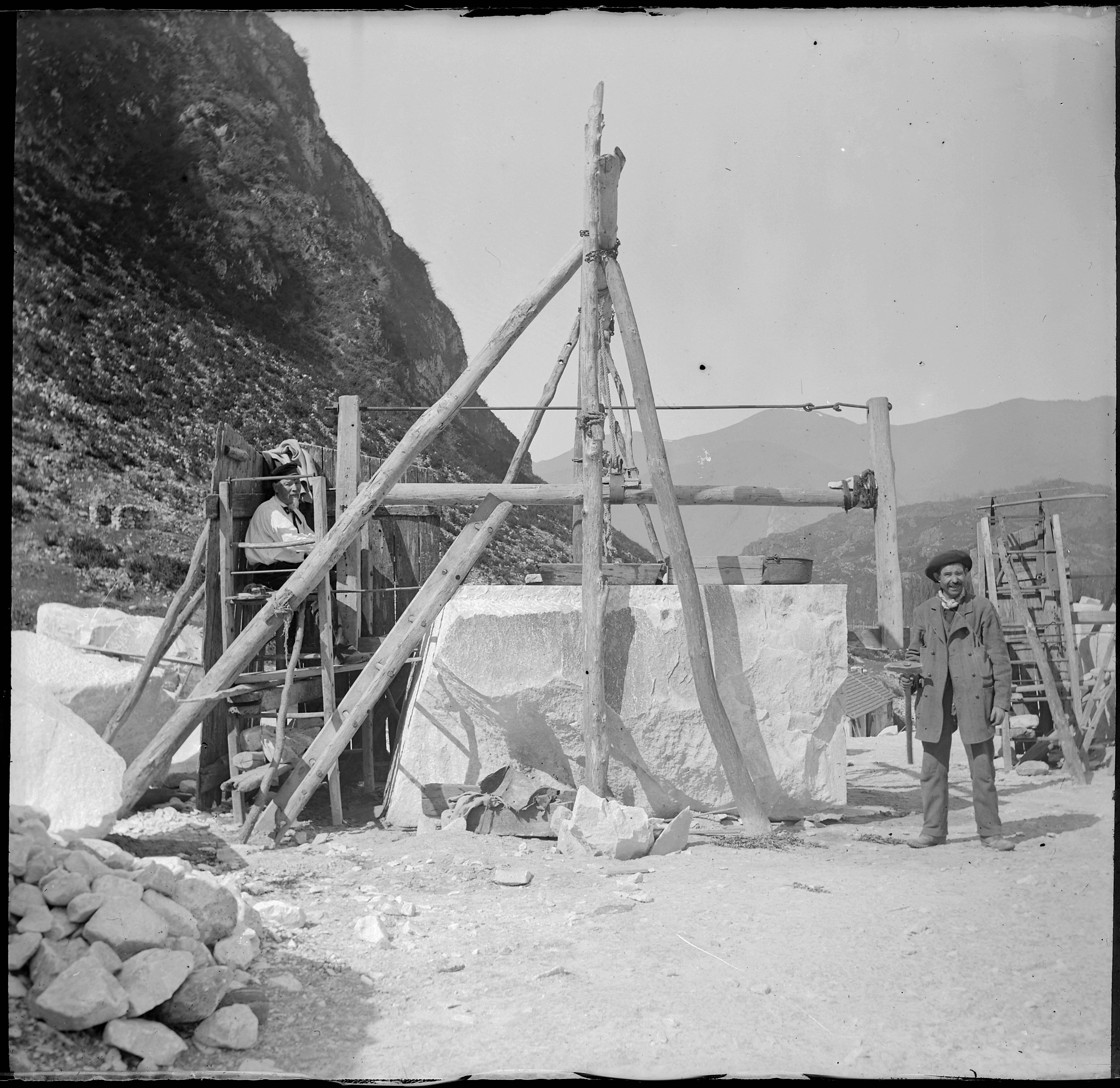 plaque négative au gélatino-bromure d'argent, format 8x9 cm. Inscription manuscrite par Eugène Trutat sur l'enveloppe : "Luchon : scierie à marbre à St Béat obj. simple posé par Gourdon"